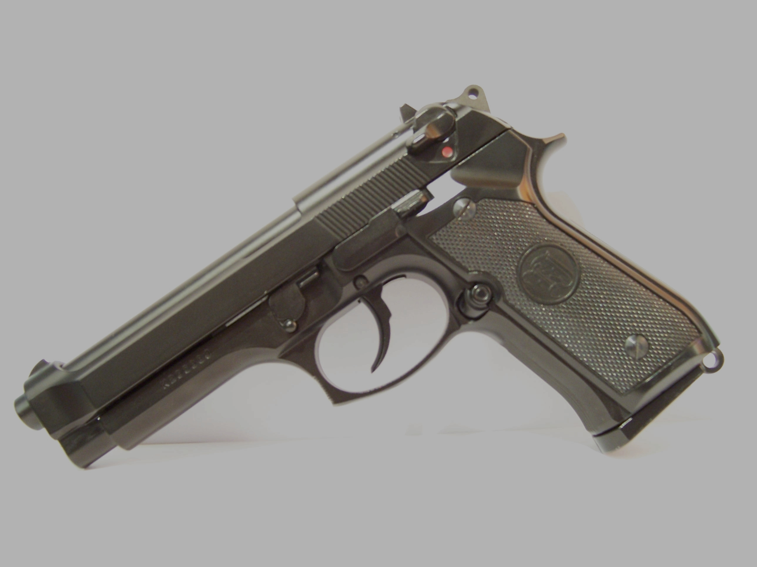 KJW Beretta M9 - 6mm BB Gas Blow Back